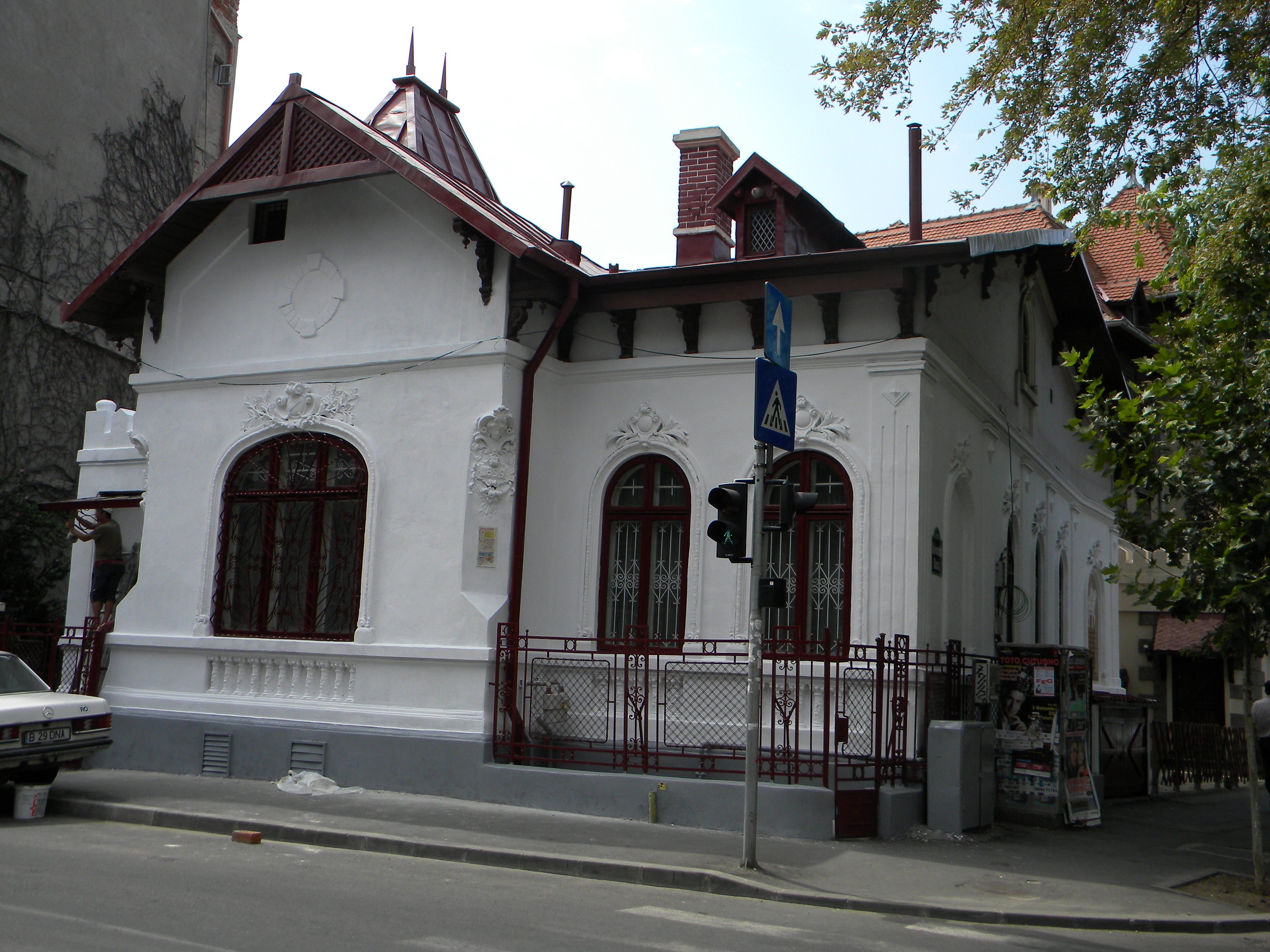 Casa pe Bd. Dacia nr. 62, Bucuresti sect. 2.JPG, (colt Bd. Dacia cu Str. Aurel Vlaicu)